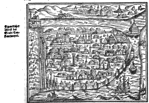 Eigentlicher Abriss der Stadt Constantinopel (view of Istanbul)